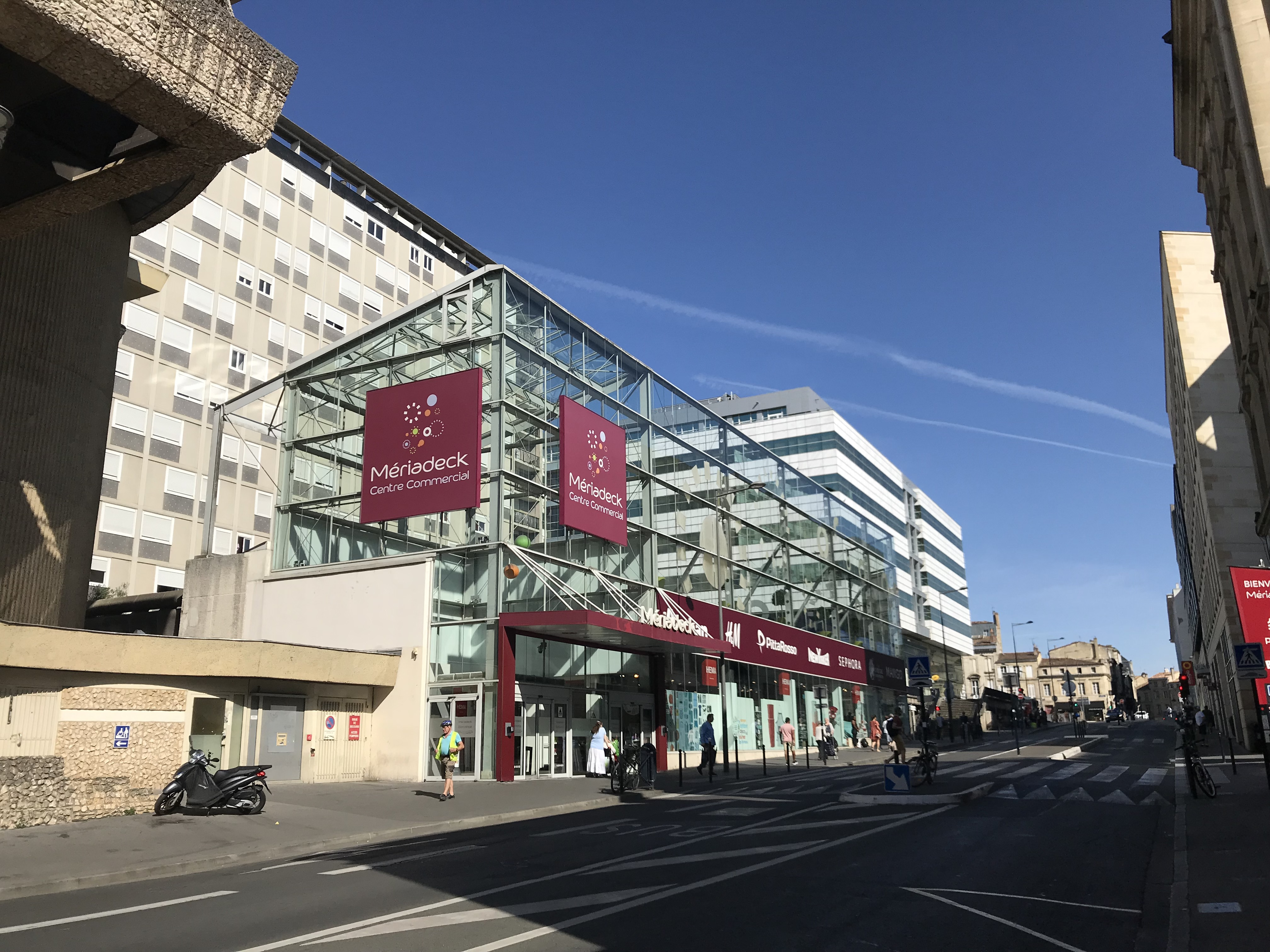 Centre commercial de Mériadeck à Bordeaux